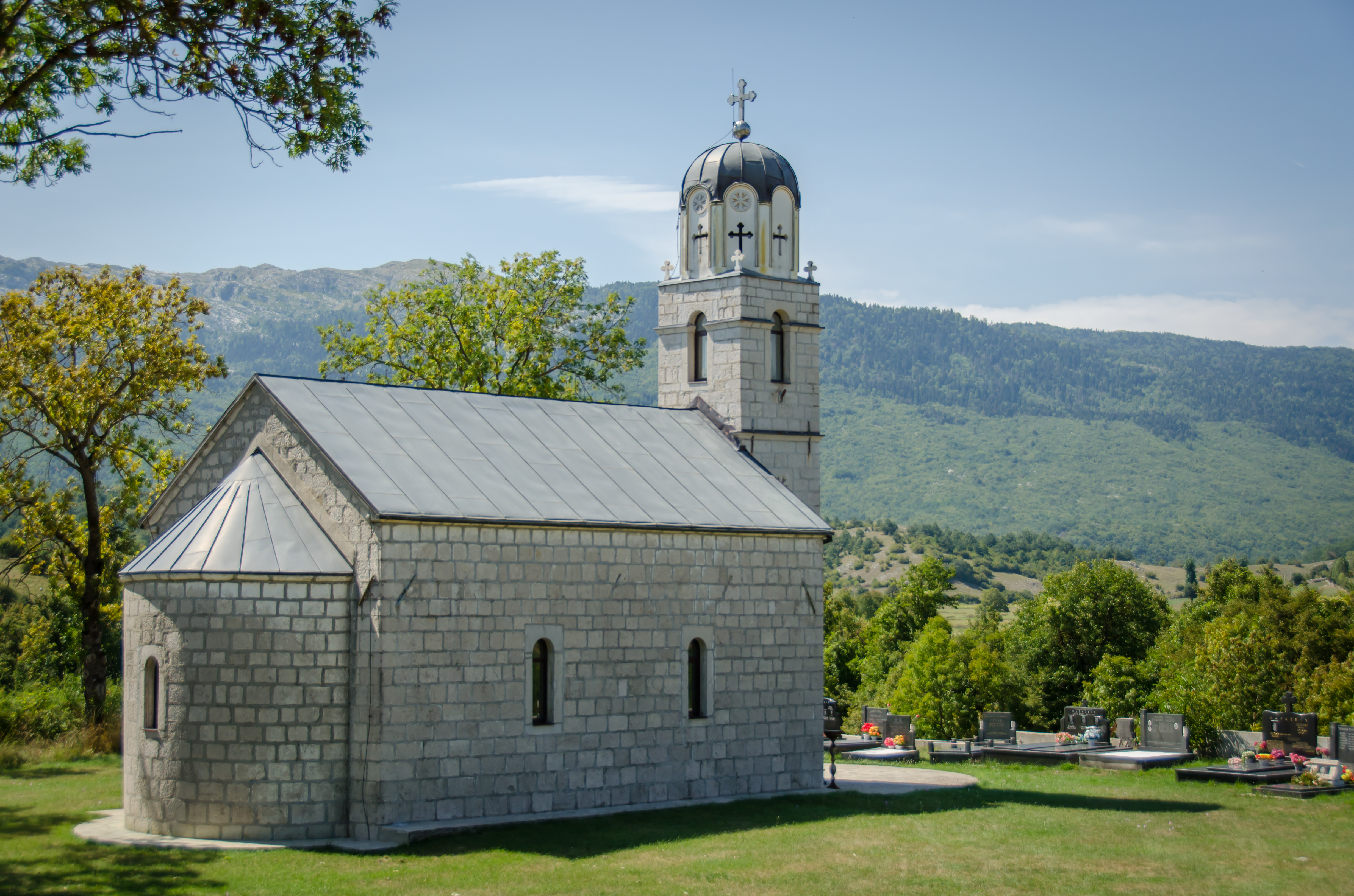 This image was uploaded as part of Trace of Soul 2018. .